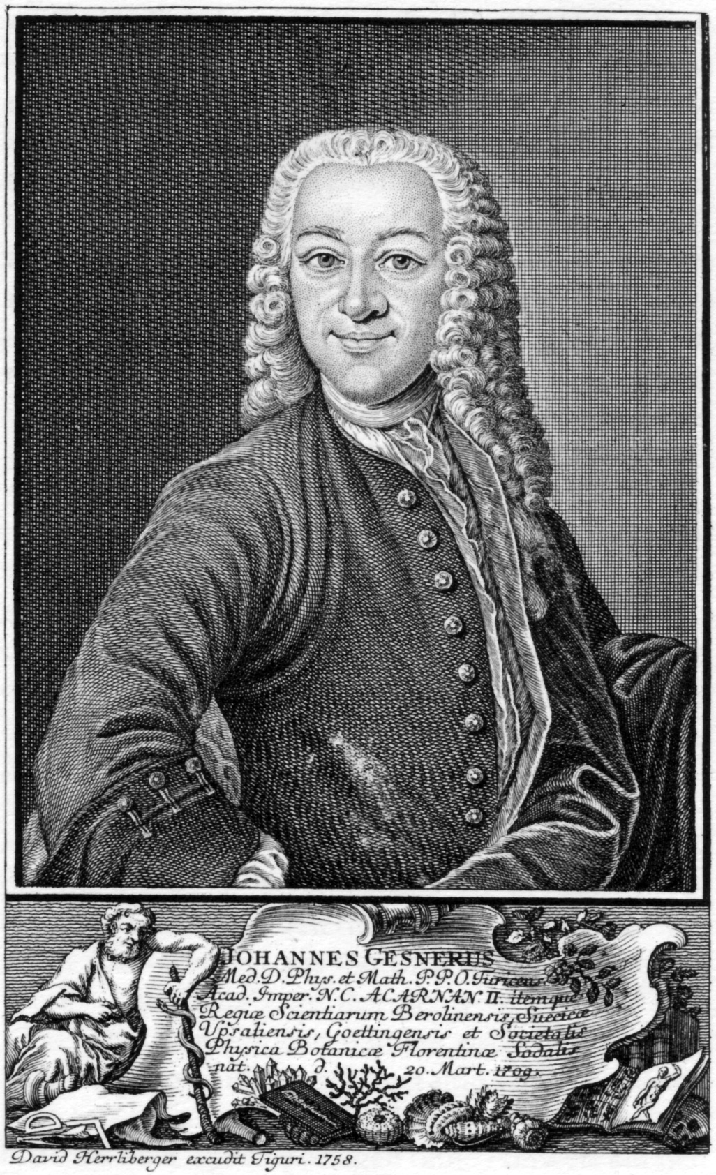 Johannes Gessner (1709–1790), Schweizer Naturforscher aus Zürich. Stich von David Herrliberger